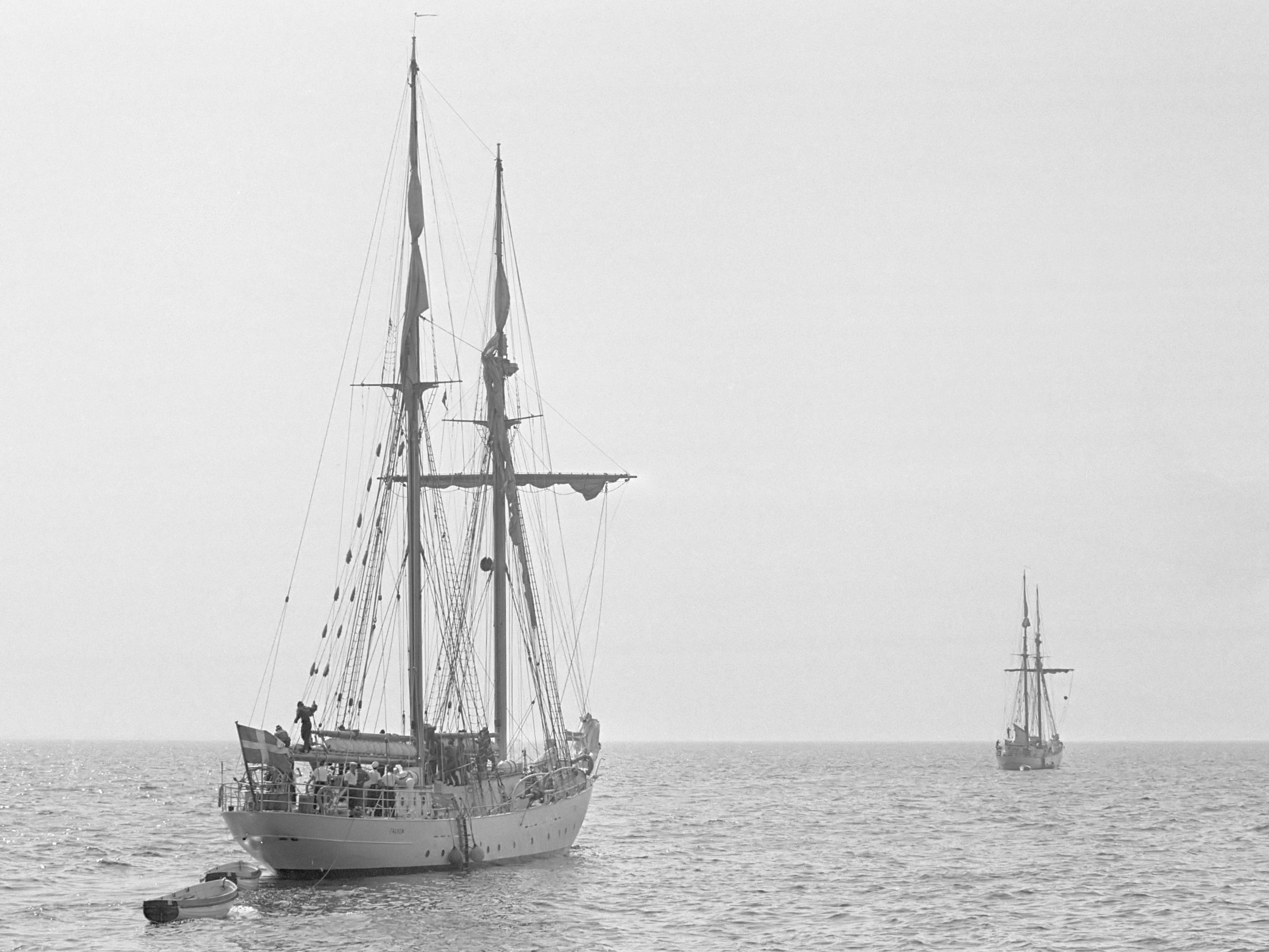 Schepen voor "Sail Amsterdam 700" bij IJmuiden gearriveerd. De zeilschepen "Falken" links en "Gladan" rechts 14 augustus 1975